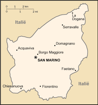 Nederlandse vertaling CIA-kaart